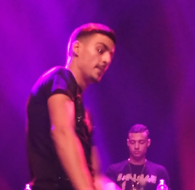 Boef is een Nederlandstalige rapper. Foto gemaakt op 1 september 2017 in muziekpodium Paard van Troje, Den Haag.